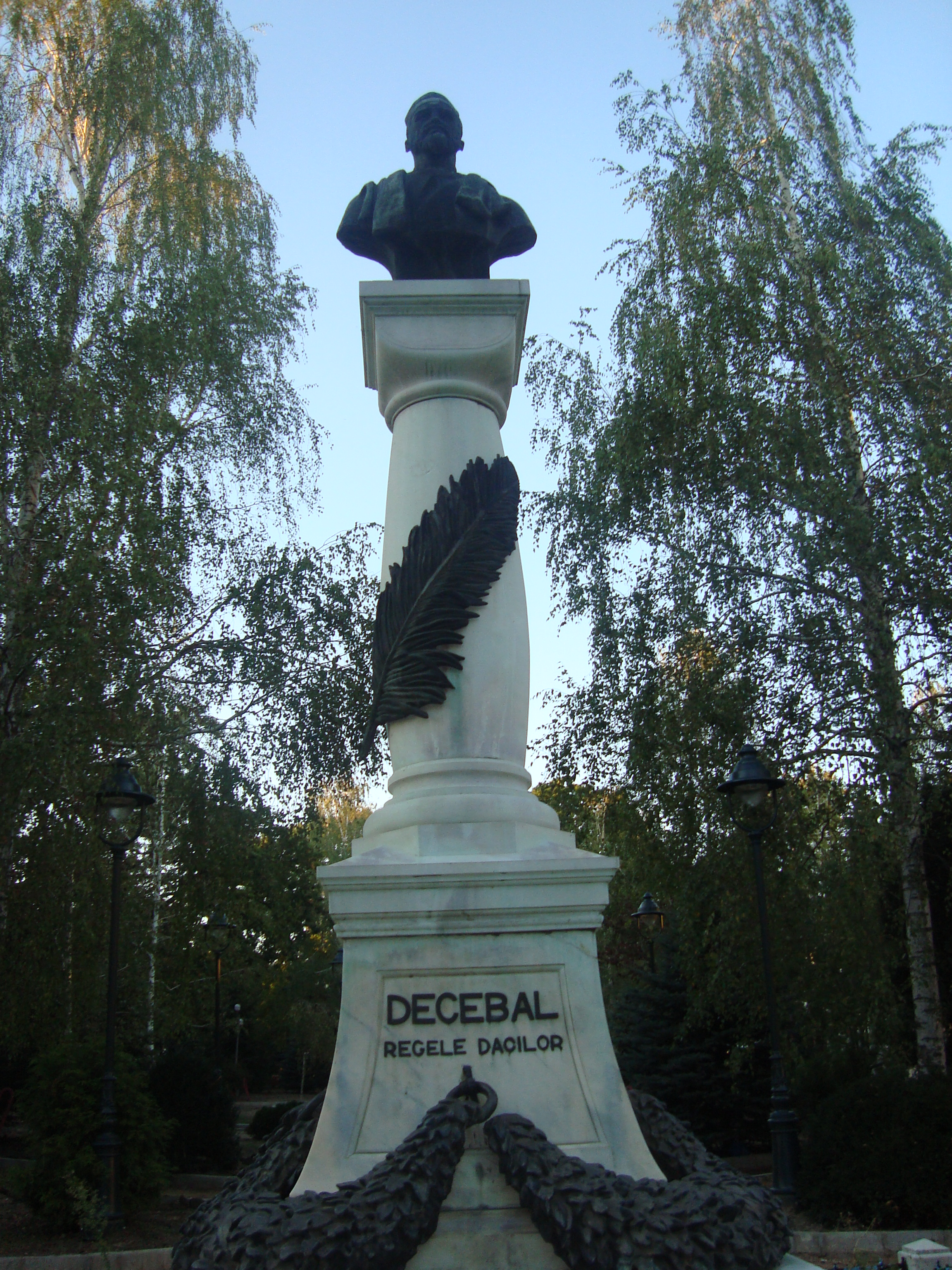 statuie